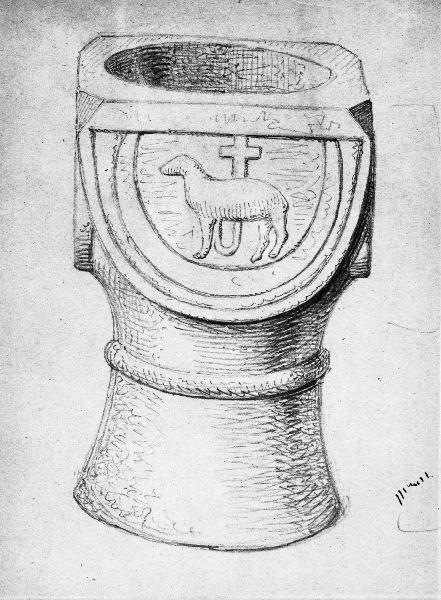 Dopfunt, sandsten, fyrsidig cuppa, 1100-talet. Foto efter teckning av Gustaf Brusewitz. Kategori: (04) DopfuntarDopfunt, sandsten, fyrsidig cuppa, 1100-talet. Foto efter teckning av Gustaf Brusewitz.